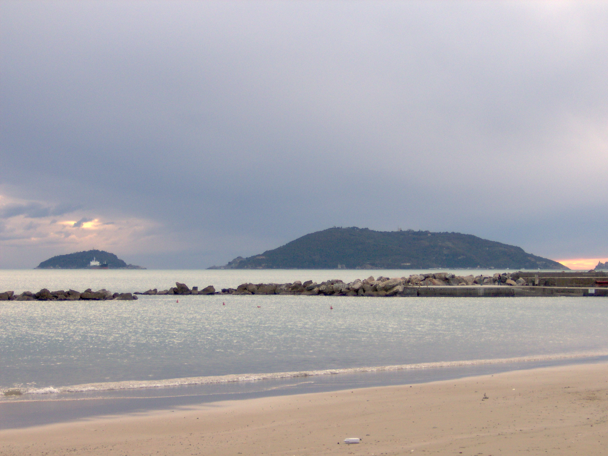 Foto dell'isola Palmarie e dell'isola (minore) del Tino. William Domenichini, 29 dicembre 2004. ore 15.00 circa